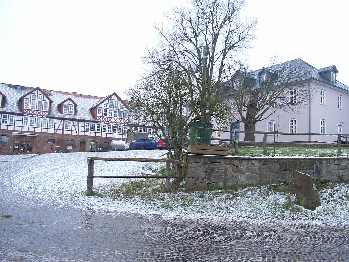 Hof Fleckenbühl, Cölbe-Schönstadt, Hessen; links Käserei und Hofladen, rechts Herrenhaus, heute Verwaltumg